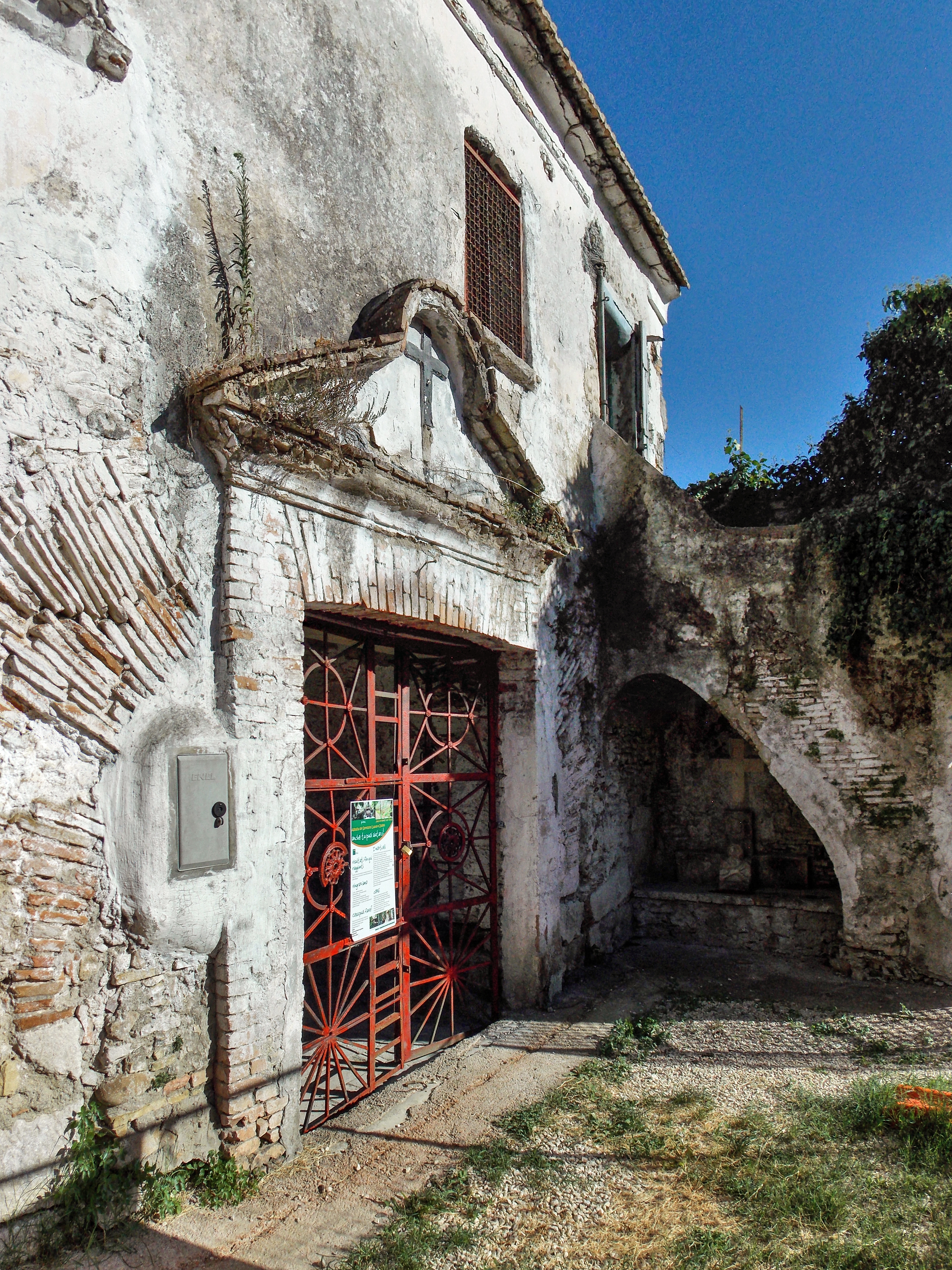 Ingresso ai ruderi dell'ex cimitero dei Morticelli, già Monastero dei santi Lupolo e Zosimo, a Benevento